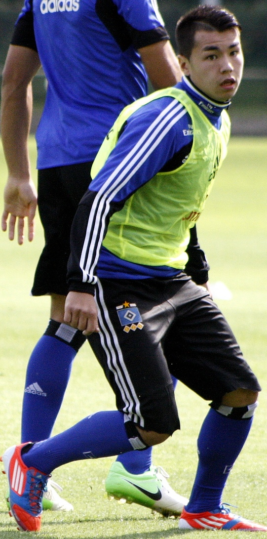 Zhi Gin Lam beim Training des HSV am 7. August 2012